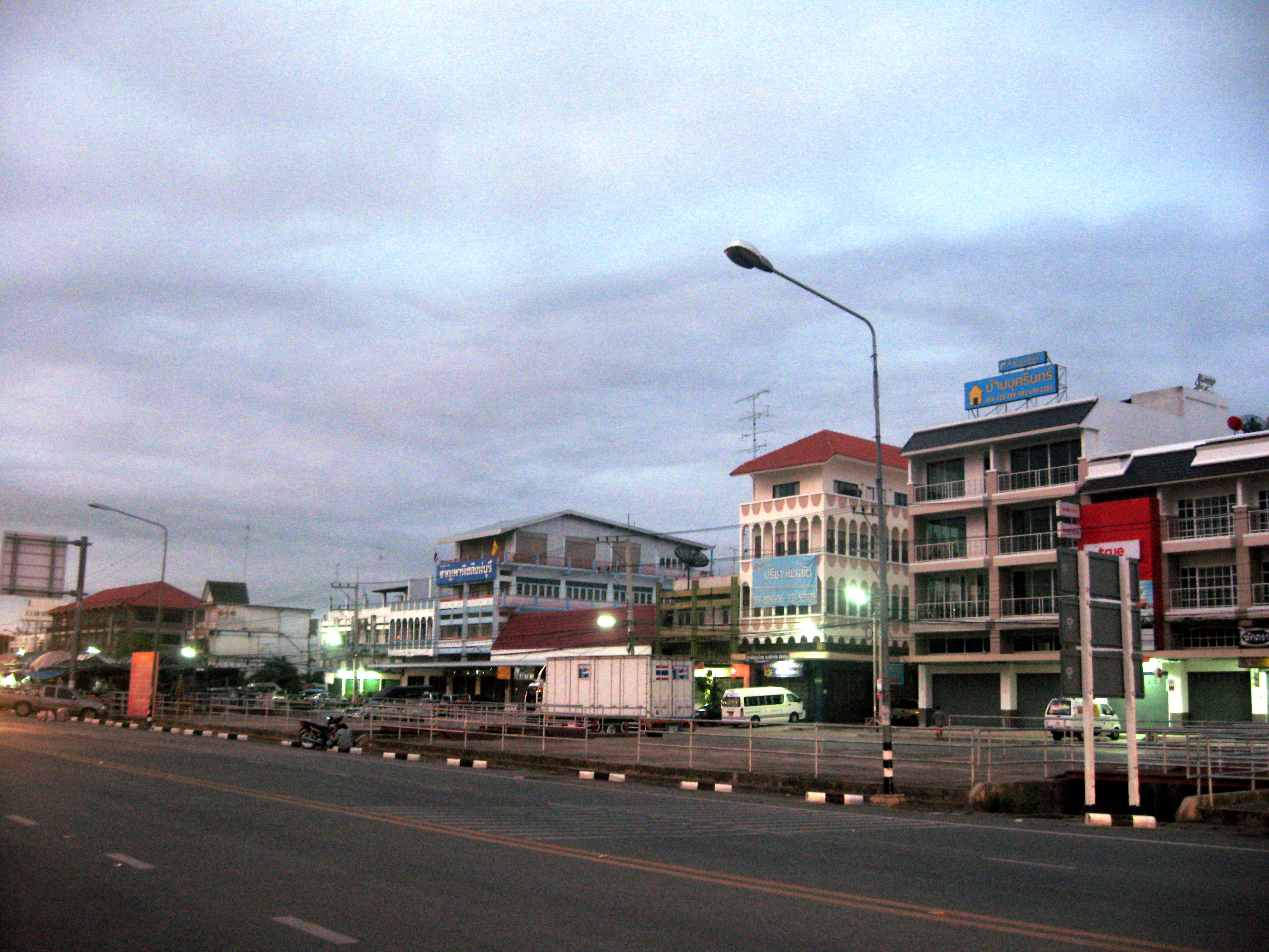 Sing Buri market:ตลาดเมืองสิงห์บุรี